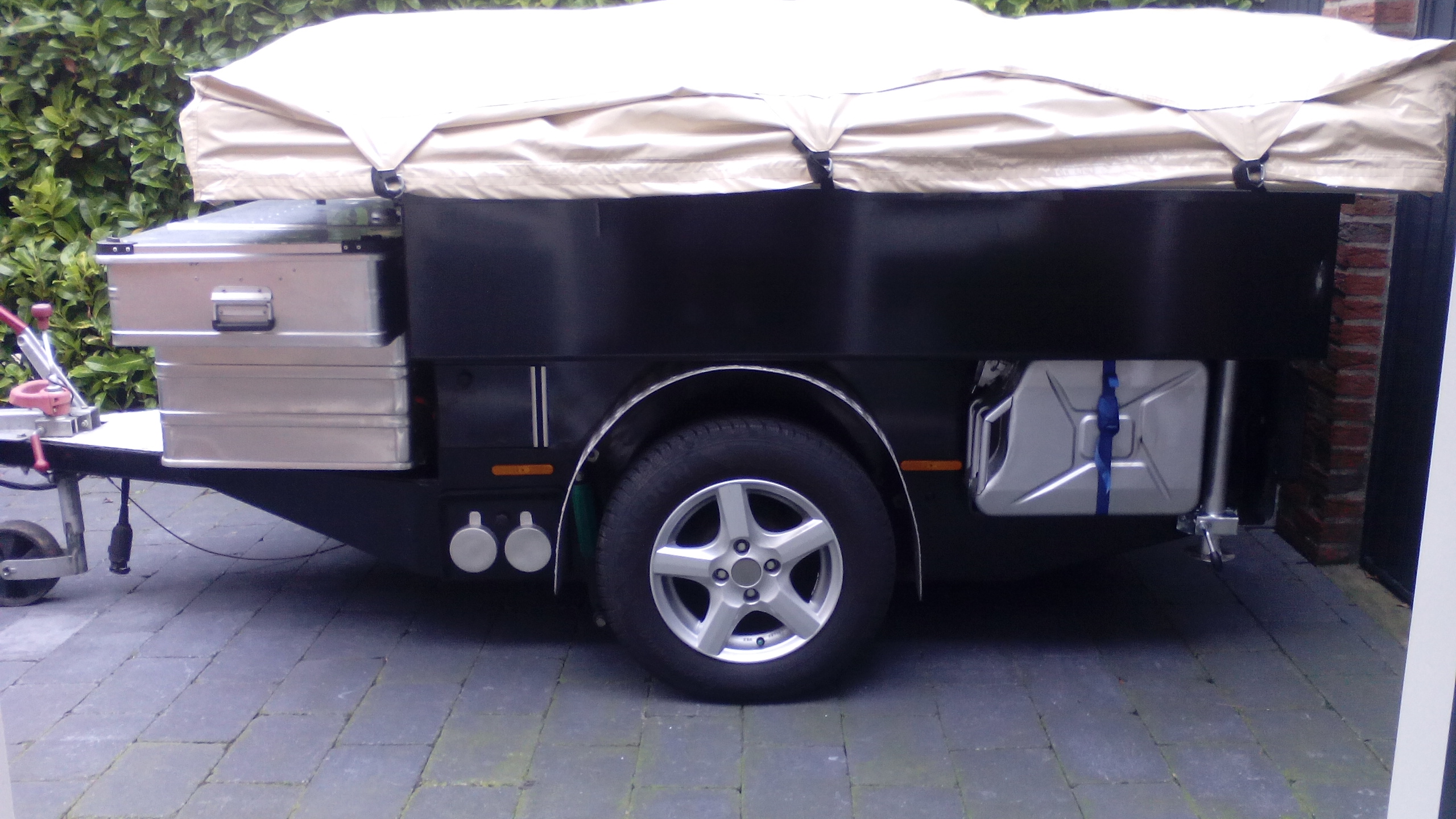 Aanhanger voorzien van tent-unit